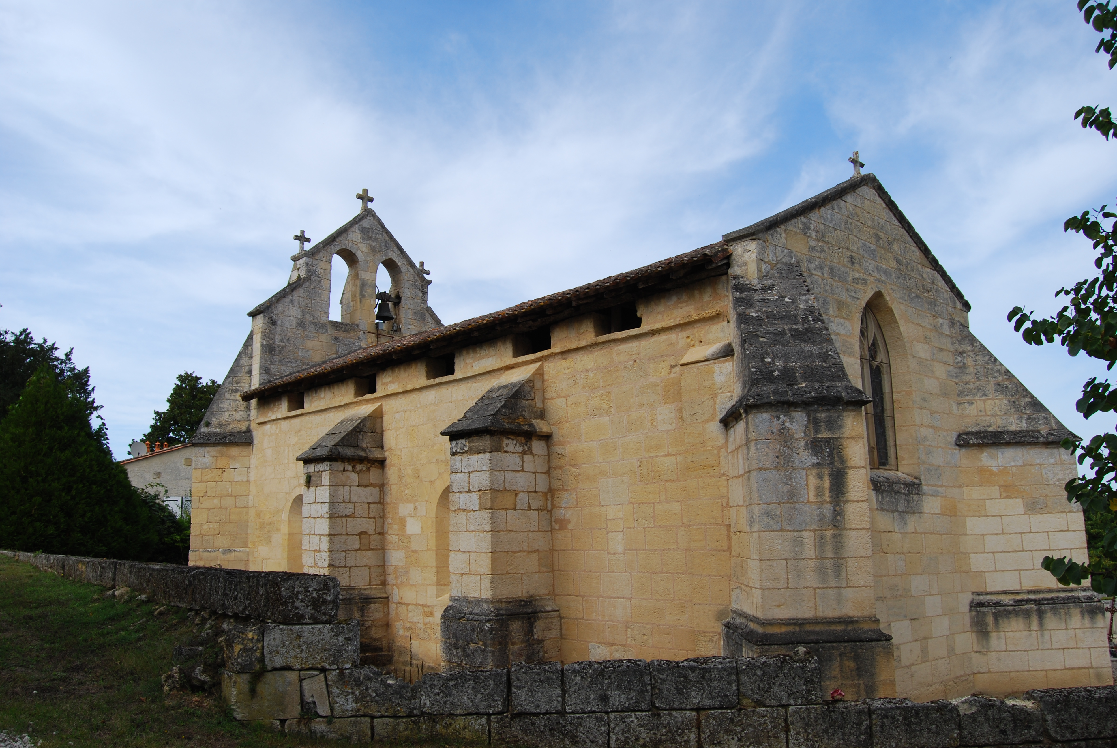 Église Sainte-Eulalie de Cadarsac, (Inscrit, 1925) .